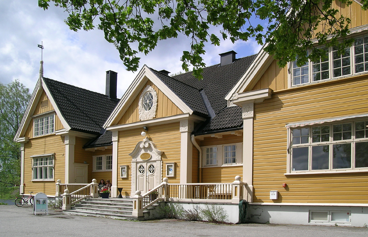 Festiviteten, Eidsvoll Verk. Bygd 1909 av Mathiesen-Eidsvoll Verk som forsamlingslokale for de ansatte ved verket